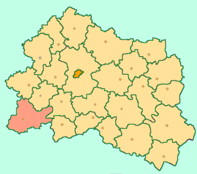 Orel Oblast map by Al Silonov Карта районов Орловской области